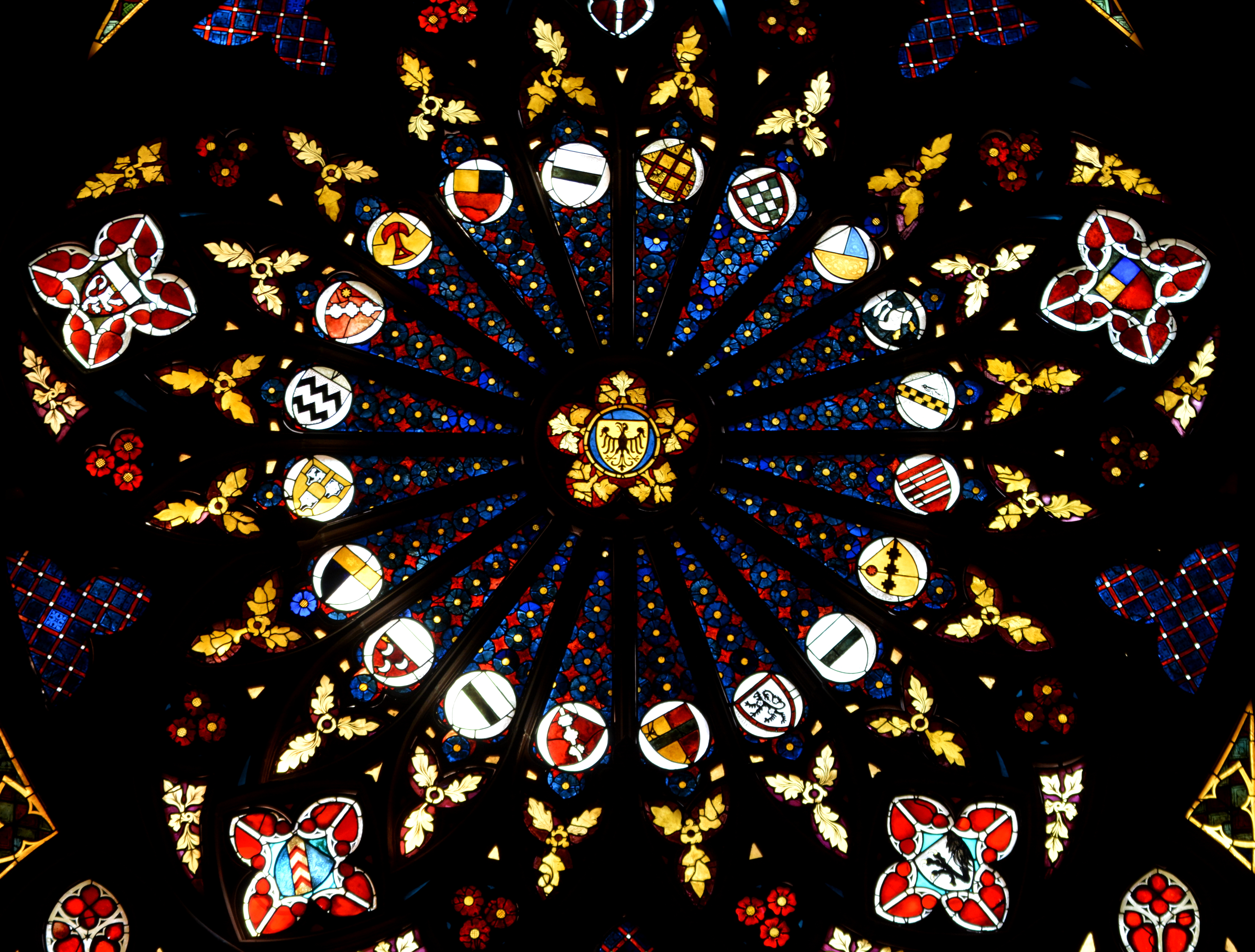 Katarinatsjerke, Oppenheim, roasfinster